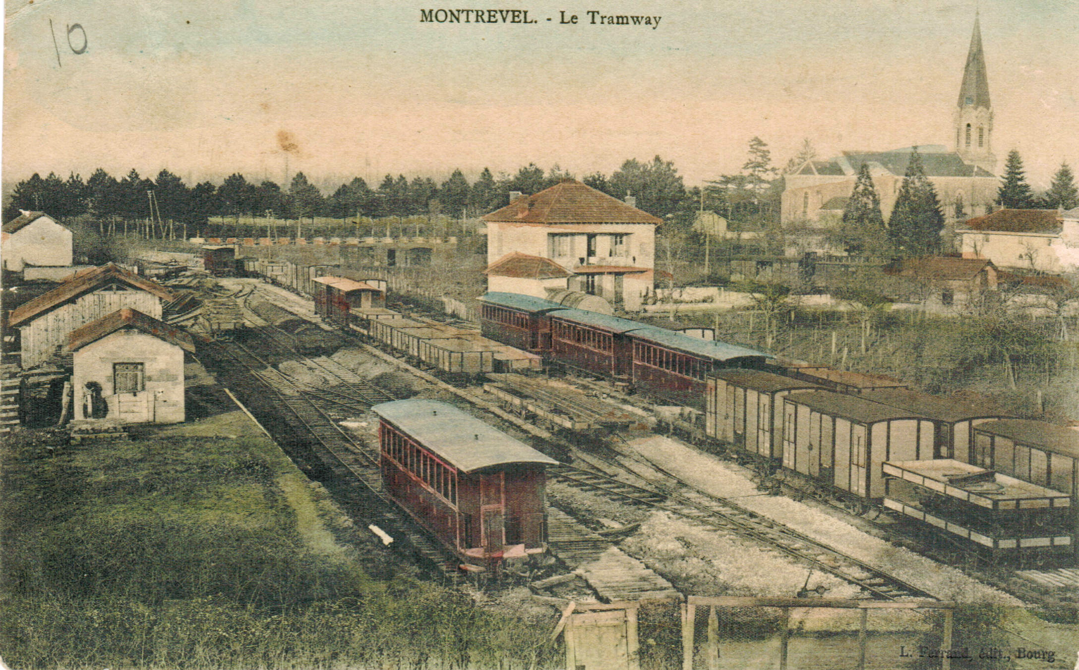 Carte postale ancienne éditée par Ferrand, éditeur à BourgMONTREVEL (Ain) - Le TramwayGare de la Compagnie des tramways de l'Ain